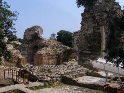 Varna, Bulgaria